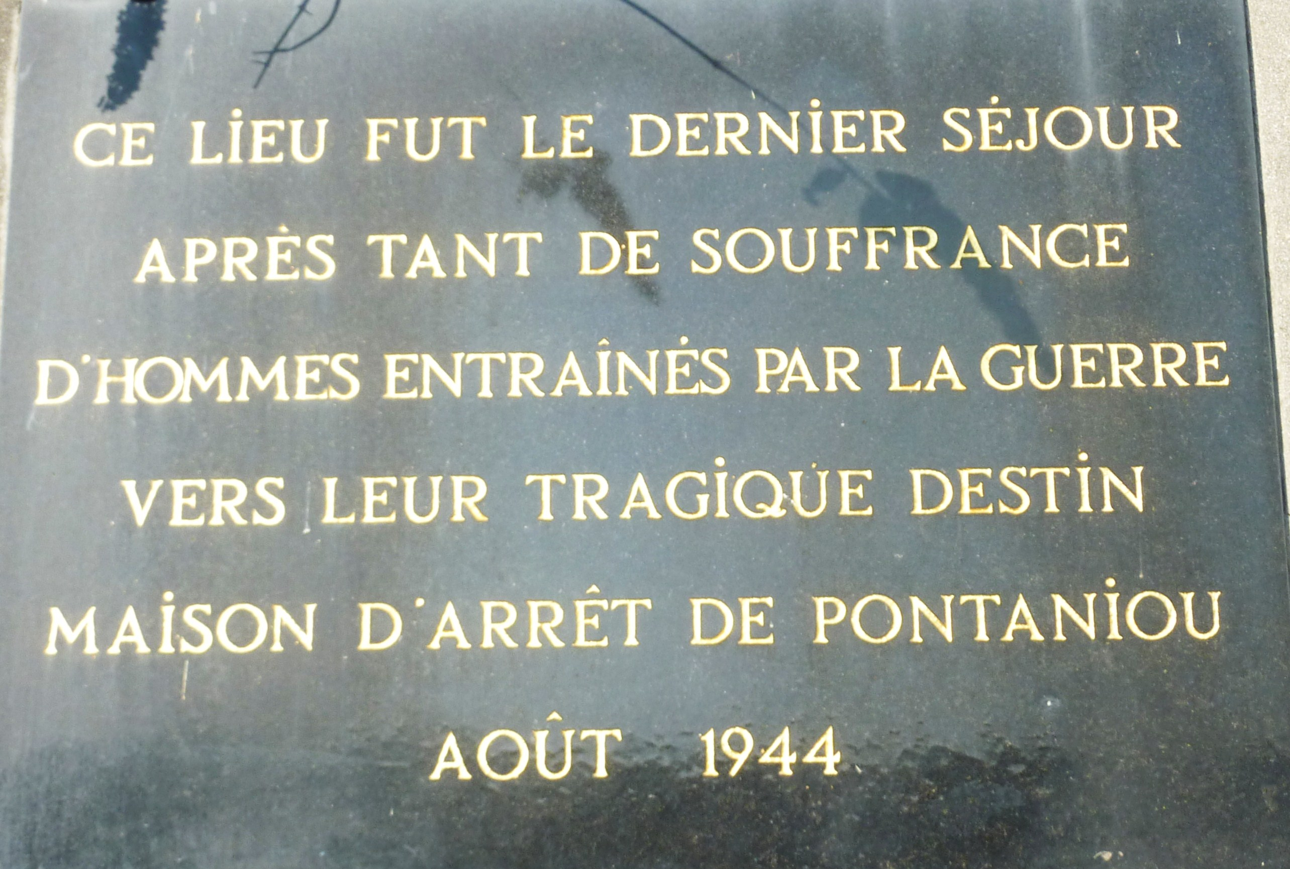 Brest Pontaniou : plaque commémorative à la mémoire des résistants qui furent emprisonnés à Pontaniou pendant la Seconde guerre mondiale